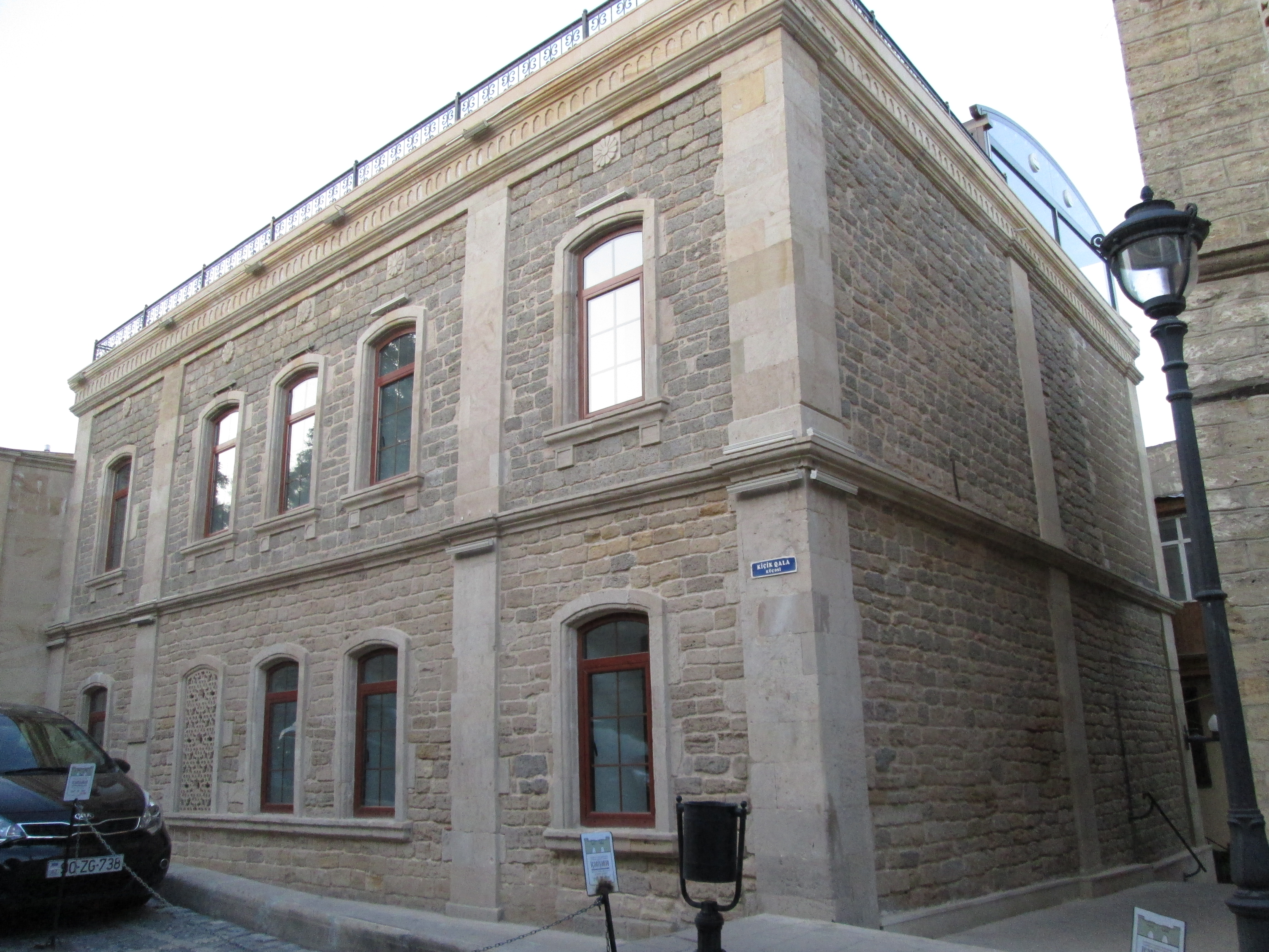 Kiçik Qala 18